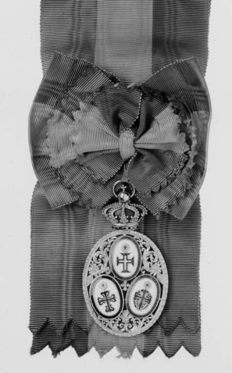 Dubbelsidigt tecken. Genombruten oval platta av guld, rankverk. I rankverket infattat tre ovala medaljonger, alla täckta med vit emalj. Den översta medaljongen är belagd med tempelherrekors täckt med röd genomsynlig emalj i sin tur belagd med vitt latinskt kors, guldkantad kantring täckt med samma emalj.Medaljongen till vänster är belagd med ett liljekors täckt med grön genomsynlig emalj, kantring täckt med samma emalj (Aviz-orden).. Den högra medaljongen är belagd med Jakobskorset (liljekors med nedre armen utdragen i spets), täckt med röd genomsynlig emalj, därbakom två grönemaljerade palmkvistar med vitt språkband, kantring täckt med samma emalj. Ovanför samtliga kors finns en vitemaljerad guldstjärna belagd med Jesu hjärta av röd emalj. Upptill på tecknet sitteren ring, däri är fäst en kunglig krona av guld samt blå och grön emalj, rödemaljerad mössa, igenom äpplet är draget en bandring av guld.